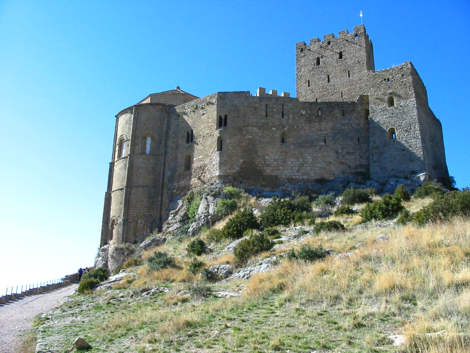 Aragonés: Castiello de Lobarre (Aragón)